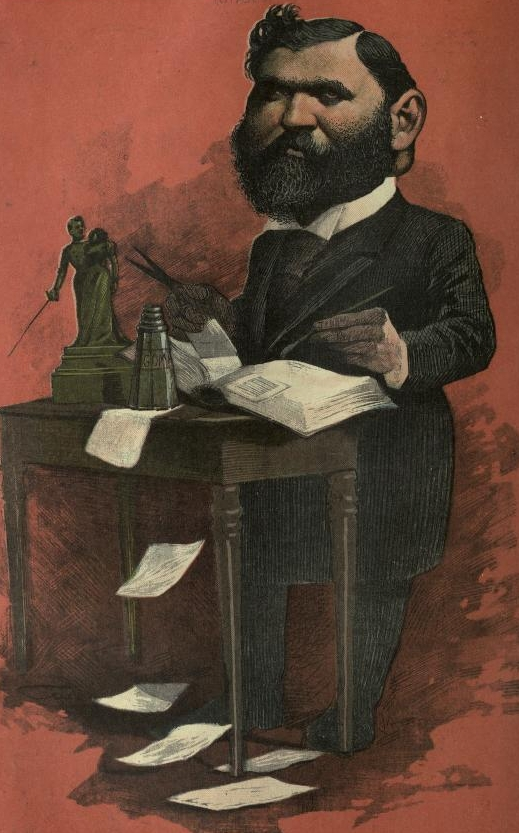 Caricatura del doctor Juan Antonio Argerich